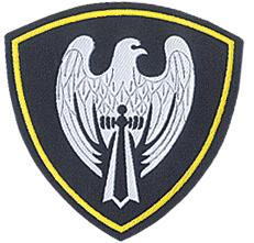 Шеврон Центрального (Московского) округа ВВ - "Сокол"